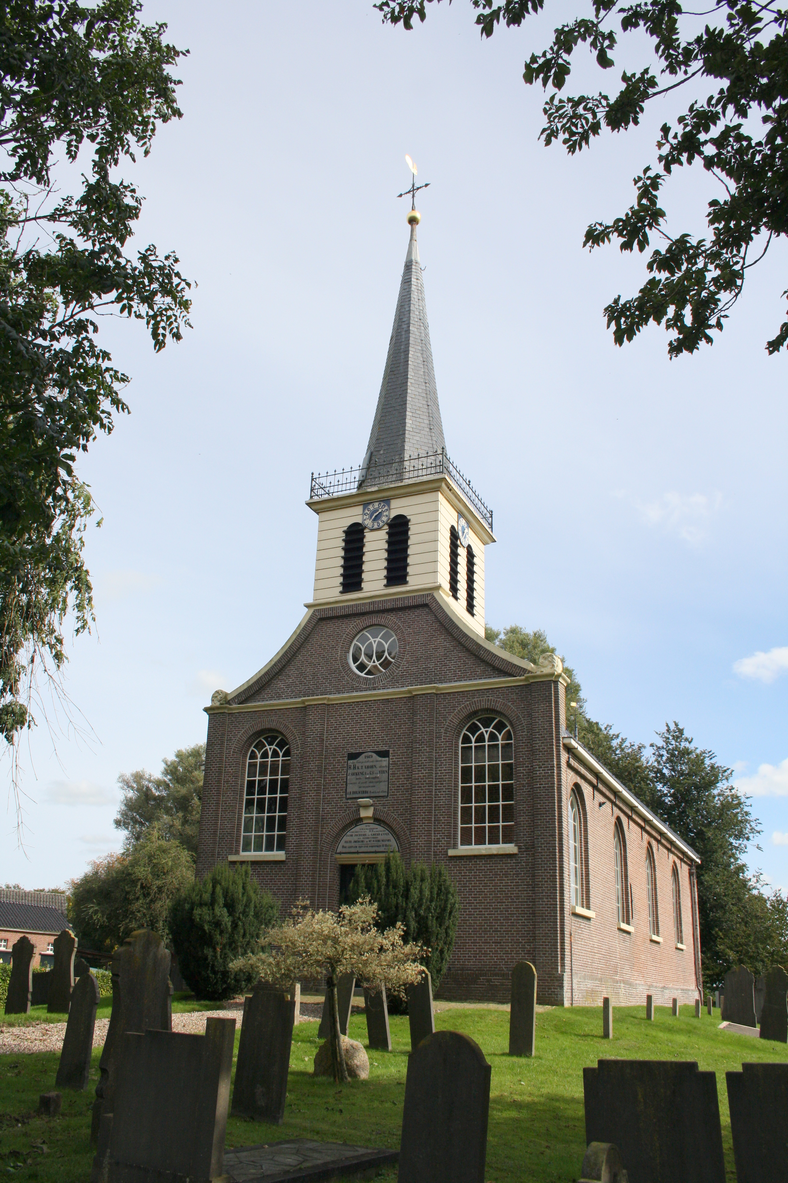 Oldelamer Hervormde kerk uit 1794 met klokkespits thans Cultureel centrum